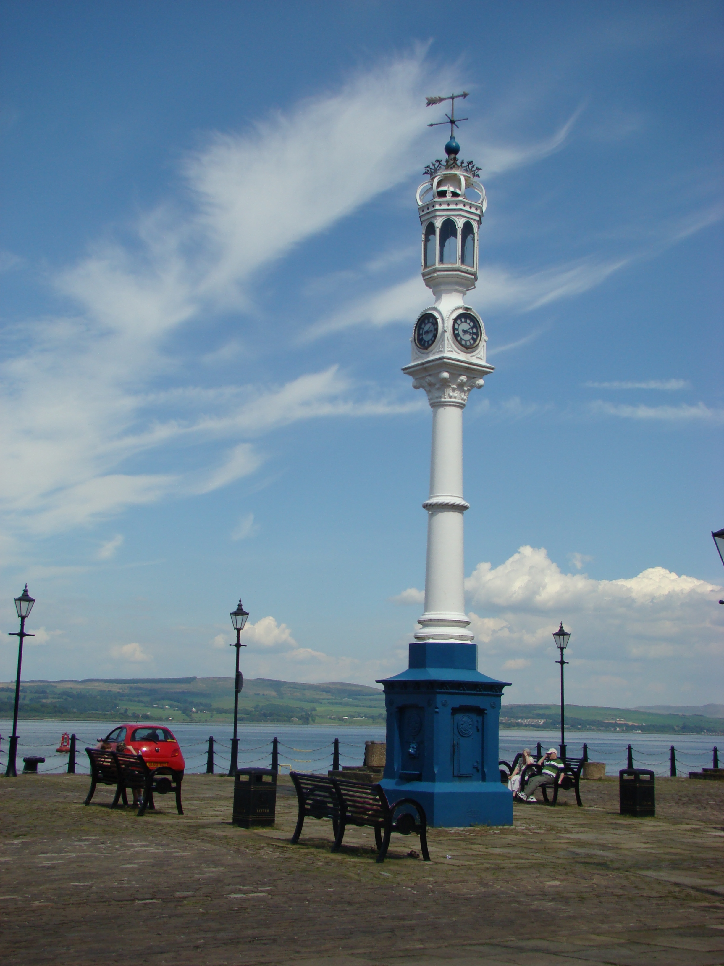 Säule am Hafen von Greenock